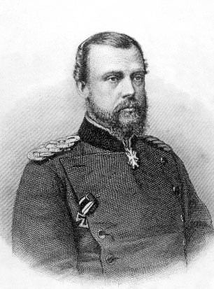 Albrecht von Preußen (1837–1906) Prince Albert of Prussia (1837-1906) Albert van Pruisen (1837-1906) Albrecht Hohenzollern (1837-1906)